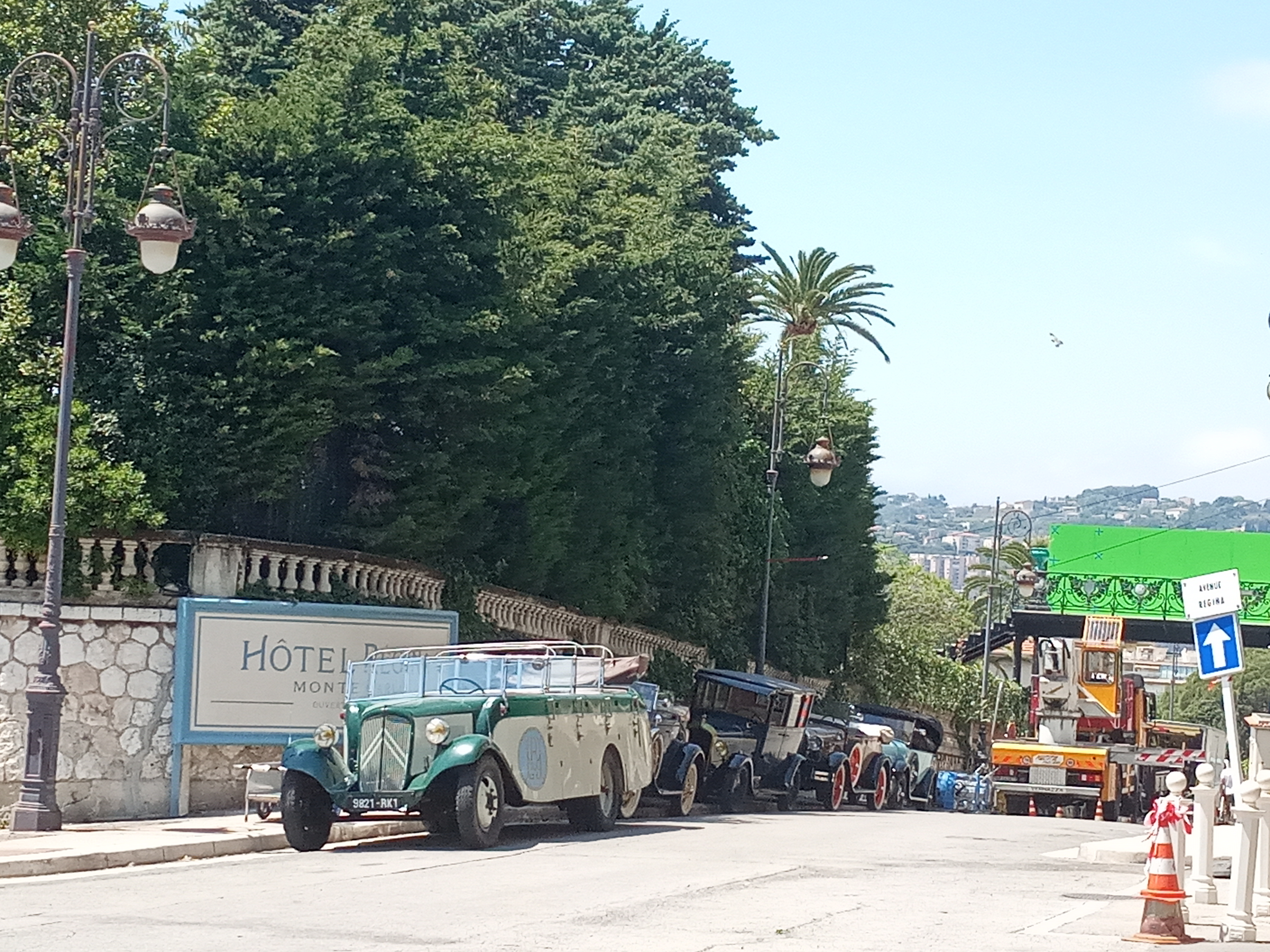 tournage rebecca au regina à Nice